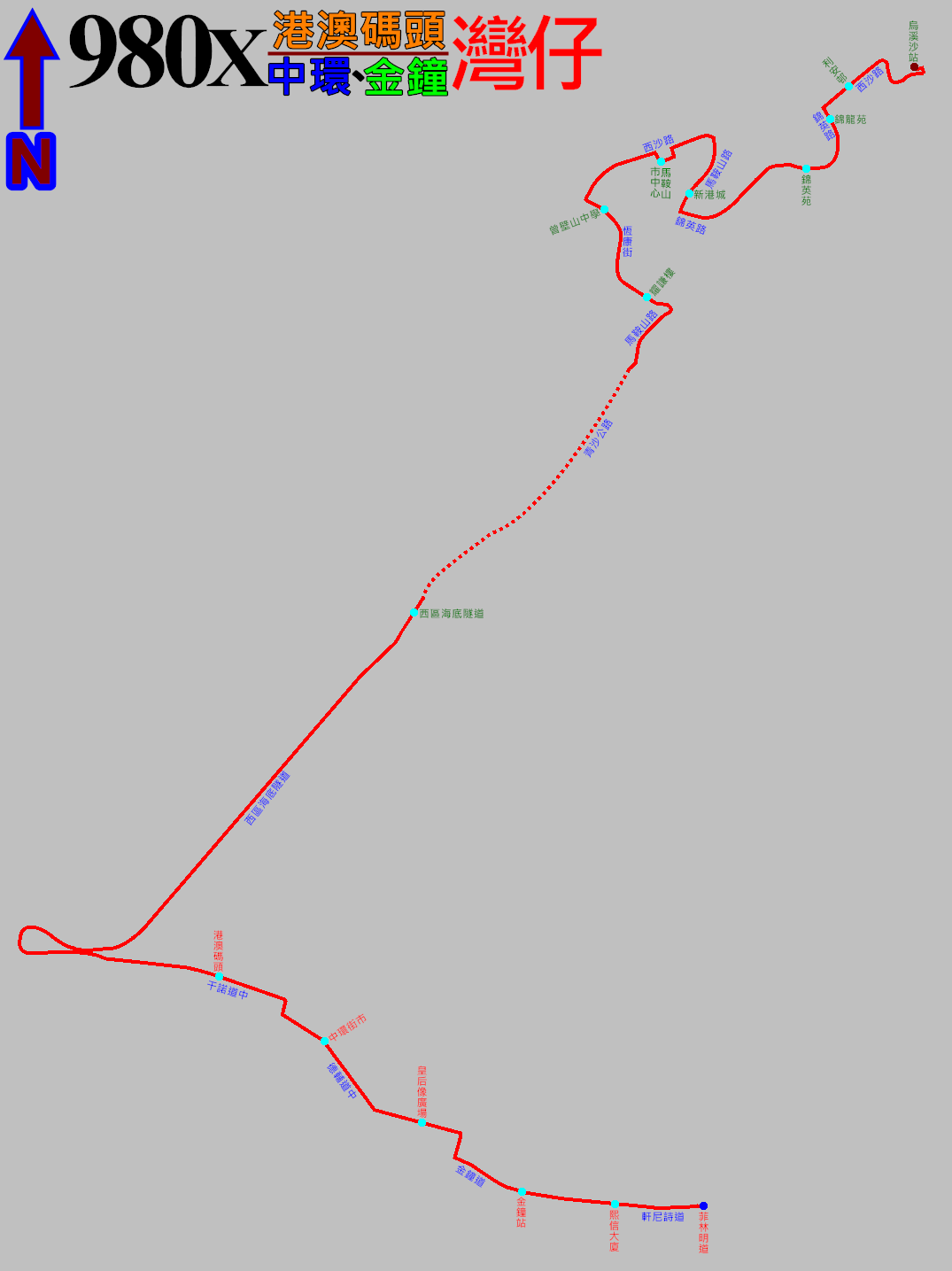 中文（香港）: 過海隧巴980X線早上班次的走線圖